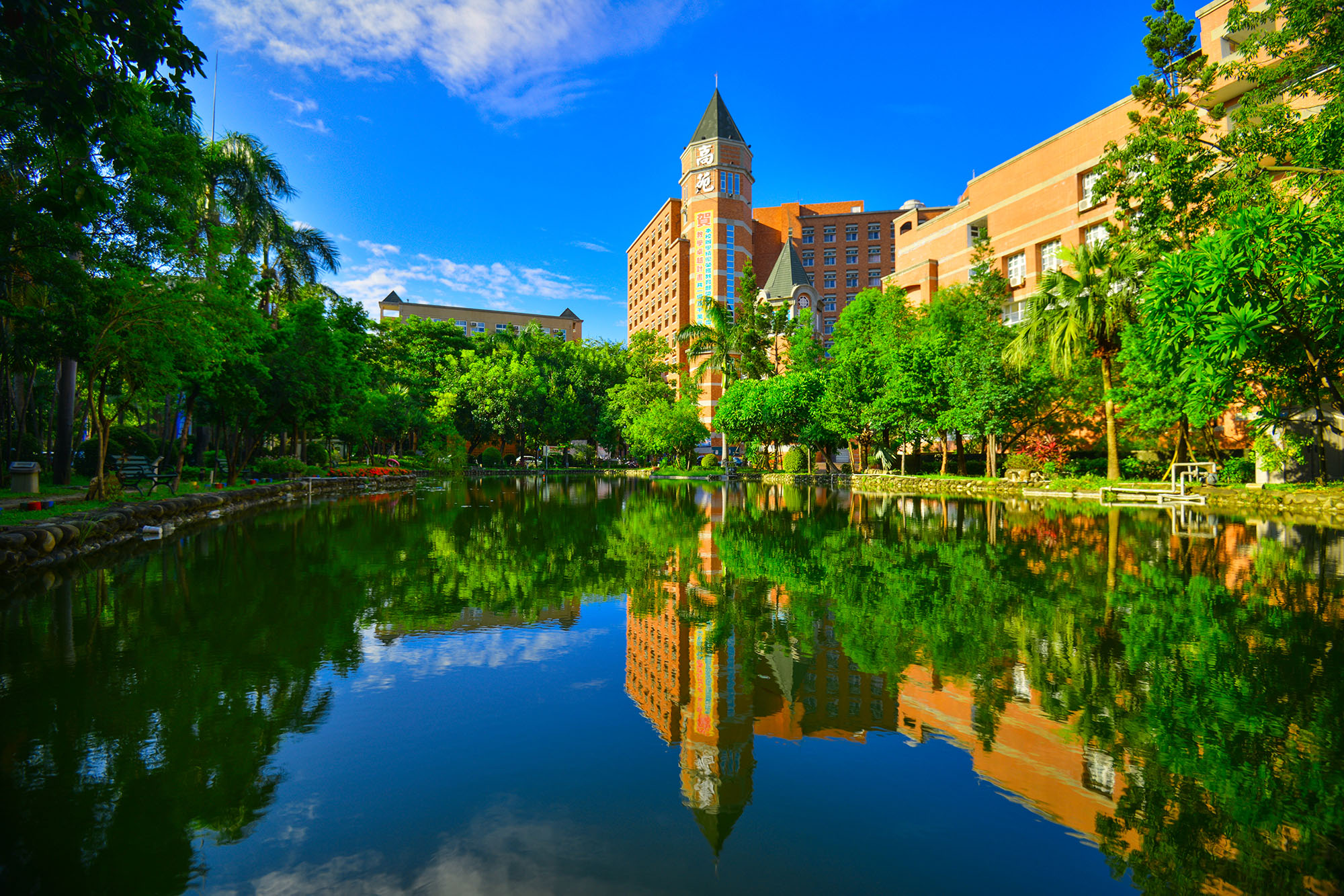 中文（台灣）: 從高苑湖往學生宿舍望過去的景觀